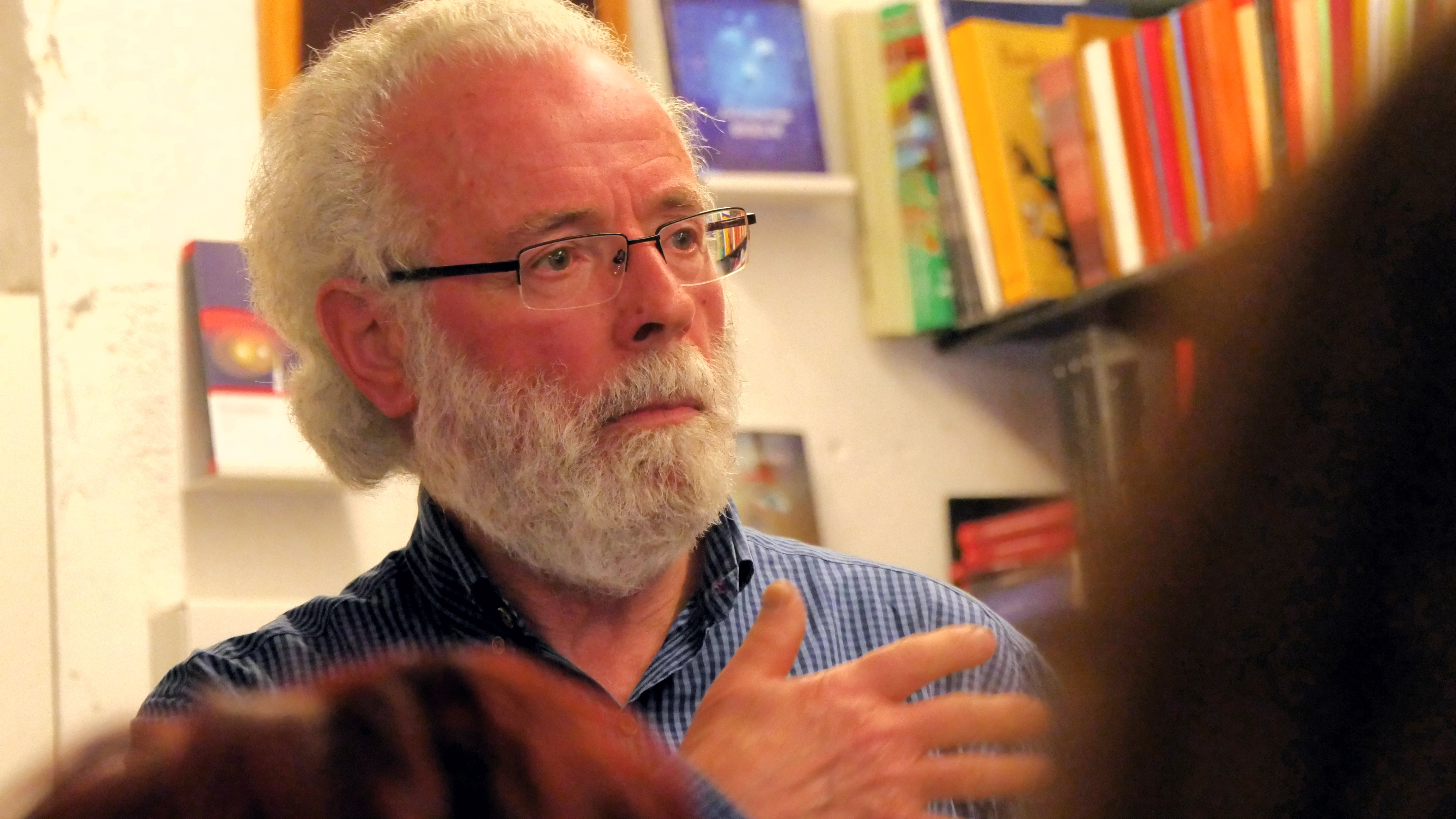 Xabier Amuriza politikari, bertsolari eta idazlea Literaturia 2018n.